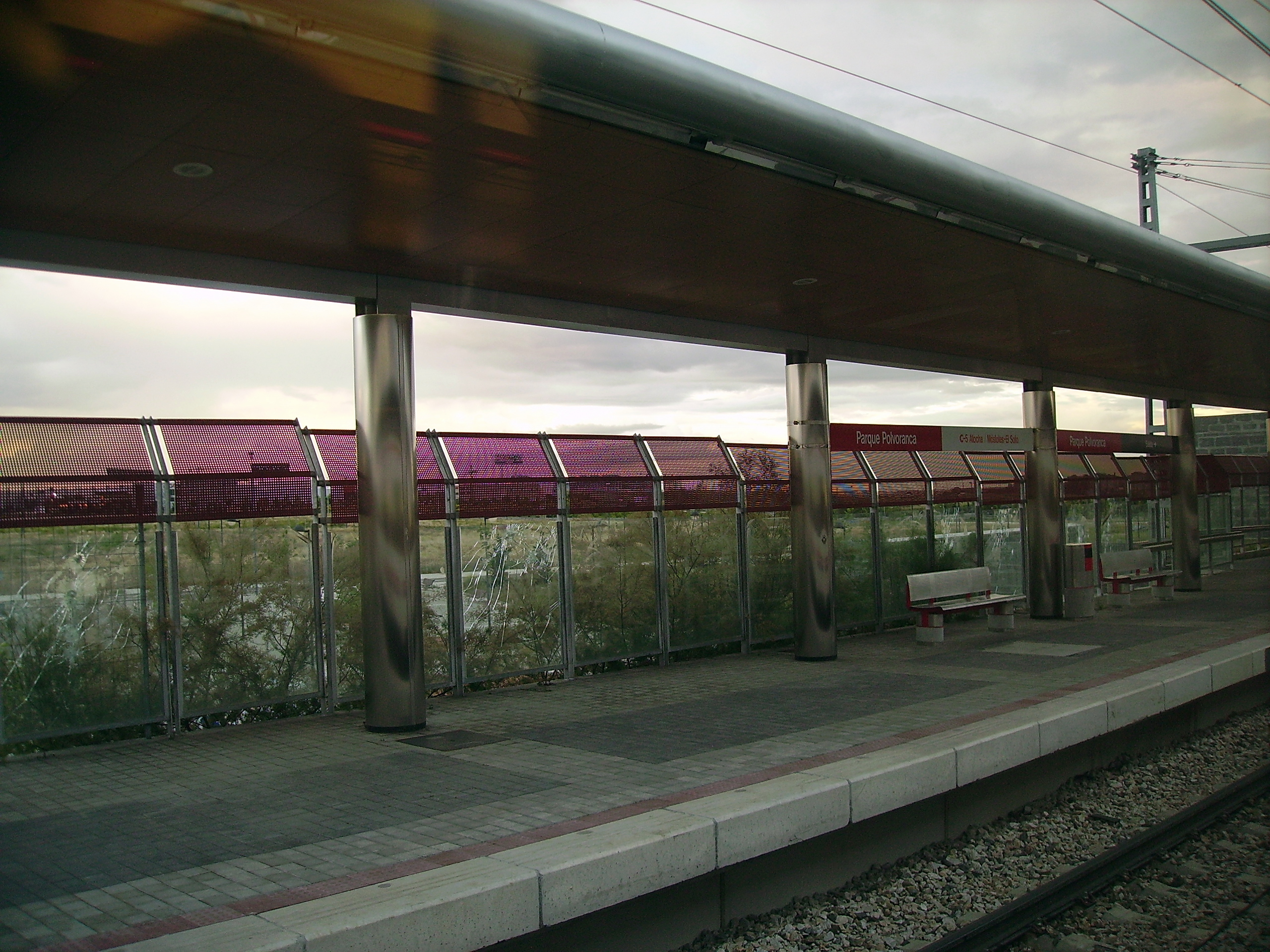 Vista de los andenes